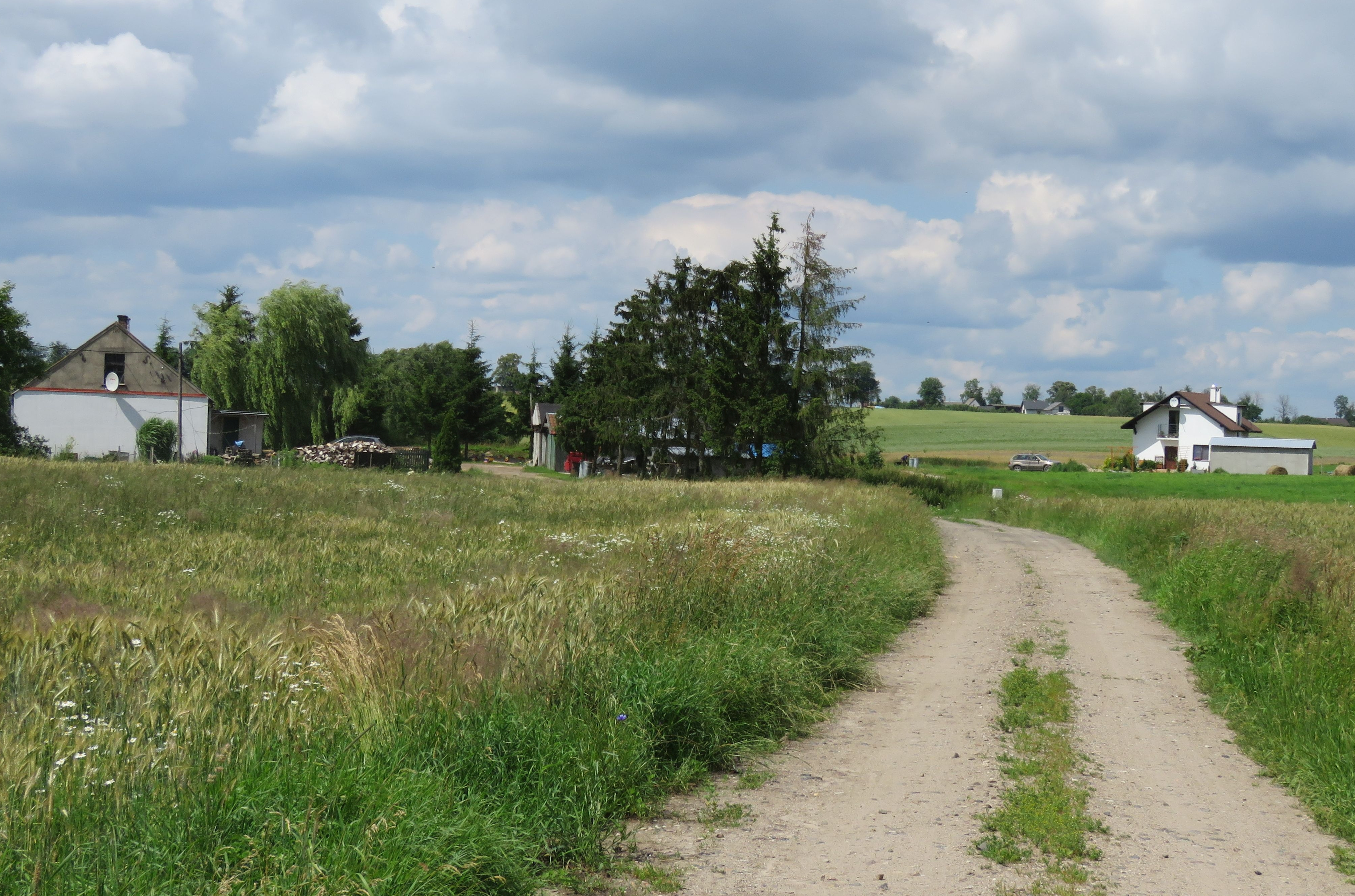 Dziarnówko Kozianka, gmina Iława